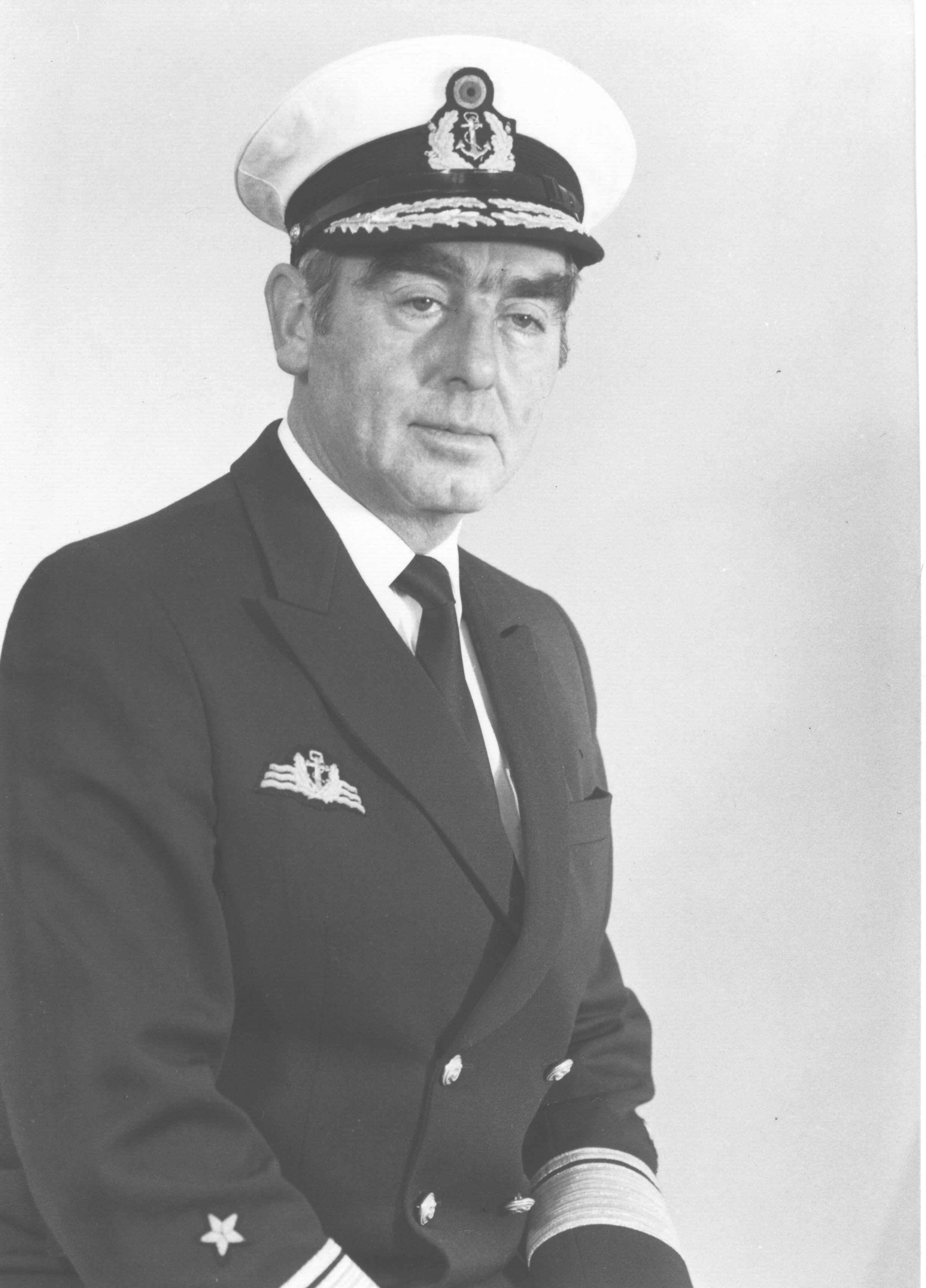 Porträtfotografie von Flottillenadmiral Horst-Helmut Wind